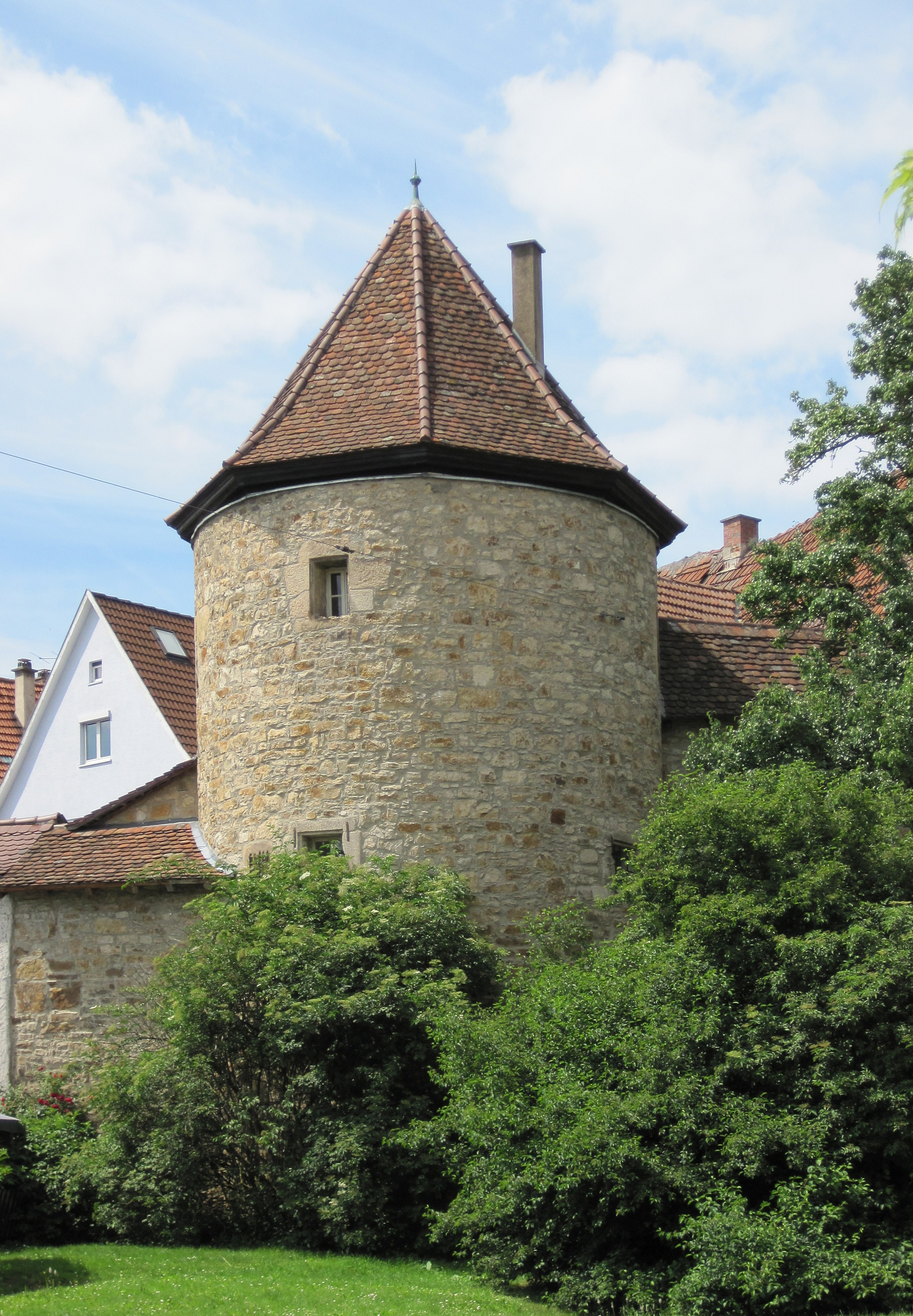 Nürtinger Blockturm. Er sicherte die südöstliche Ecke der 1354 erstmals erwähnten Stadtmauer und beherbergte das Gefängnis. Das dunkle Verlies mit nur einer Deckenöffnung ist heute noch erhalten.